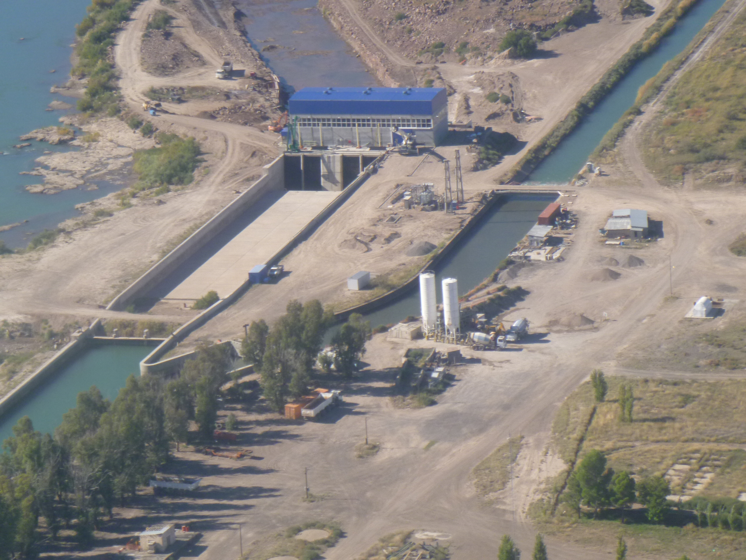 Central Hidroeléctrica Salto Andersen, sobre el río Colorado, provincia de Río negro, Argentina. Está ubicada a 66 km río arriba de la ciudad de Río Colorado.